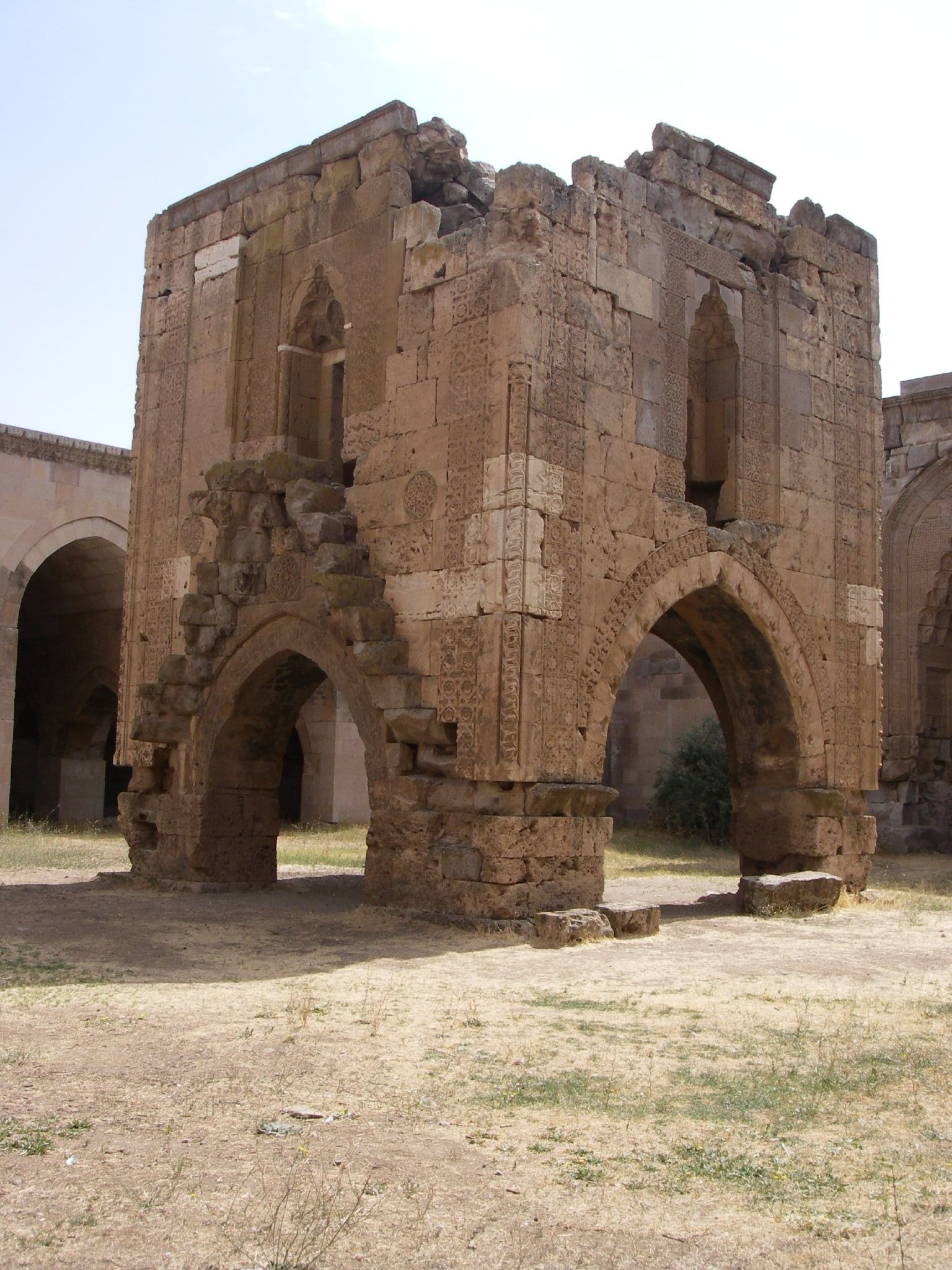 Sultanhan?